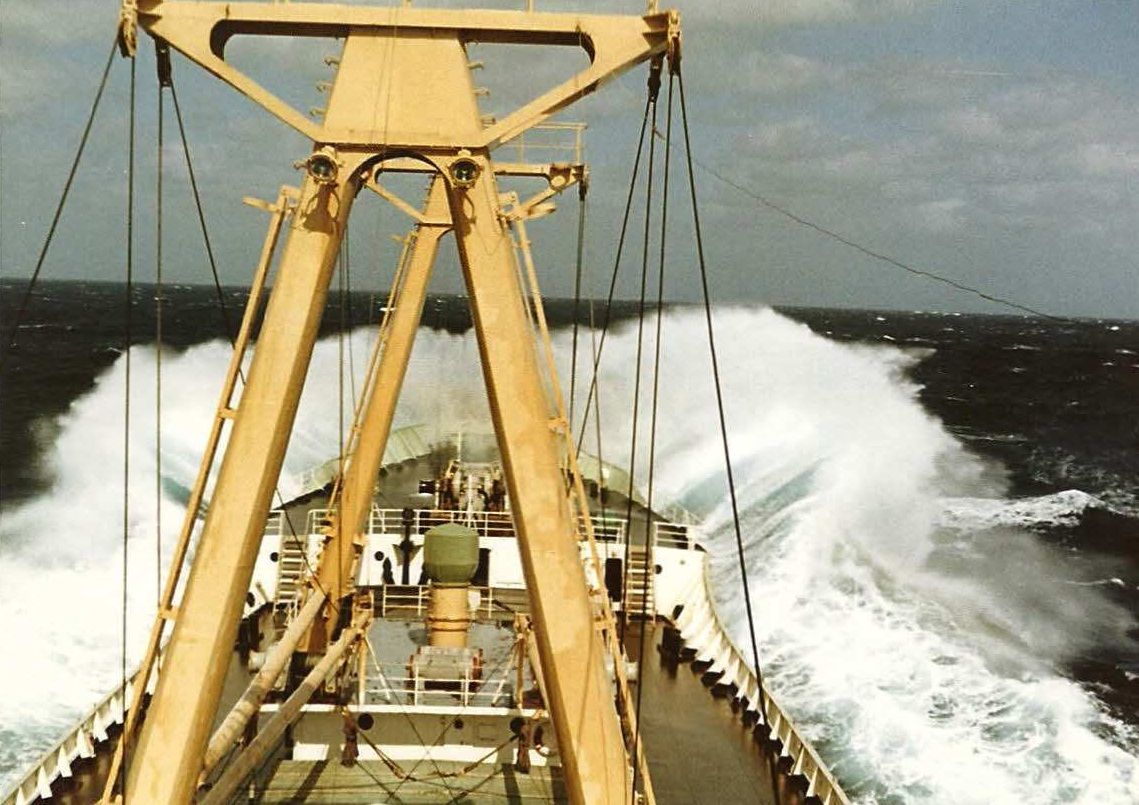 Le Bariloche dans la tempête en 1965.